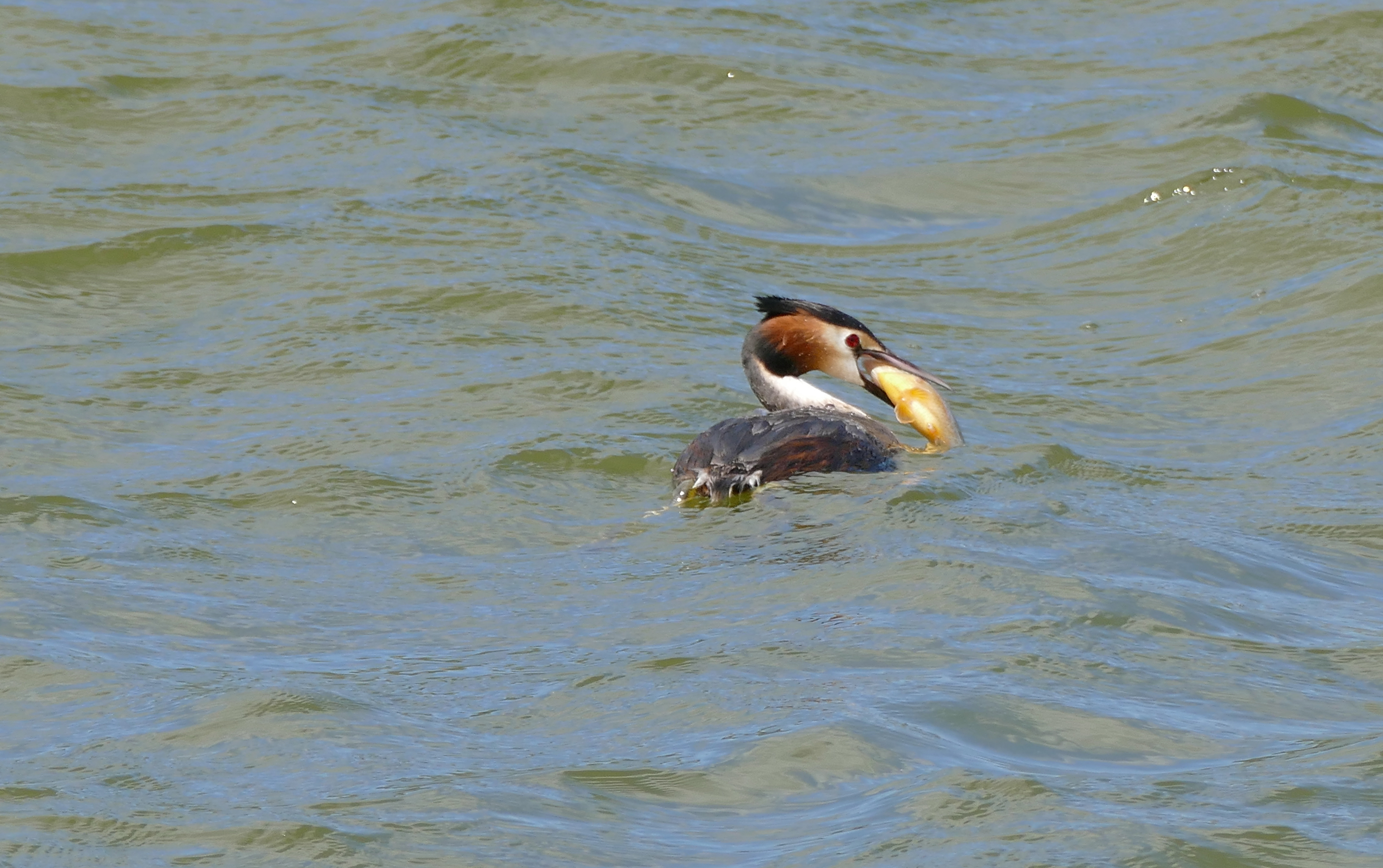 Aguait del Bruel, Bassa del Matar, Los Aiguamolls del' Empordà, Castelló d'Empúries, Catalunya, SPAIN